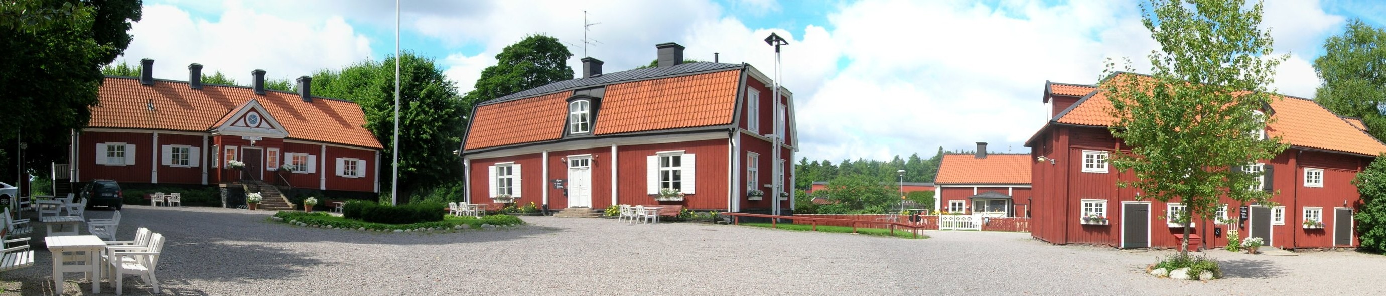 Farsta gård, Farsta strand, Stockholm, Sverige. Huvudbyggnaden uppfördes på 1680-talet.